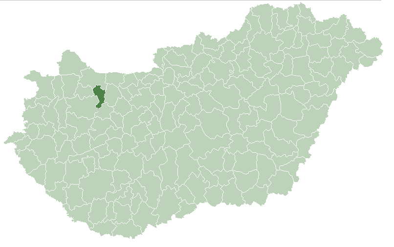 Poloha okresu v rámci Maďarska.